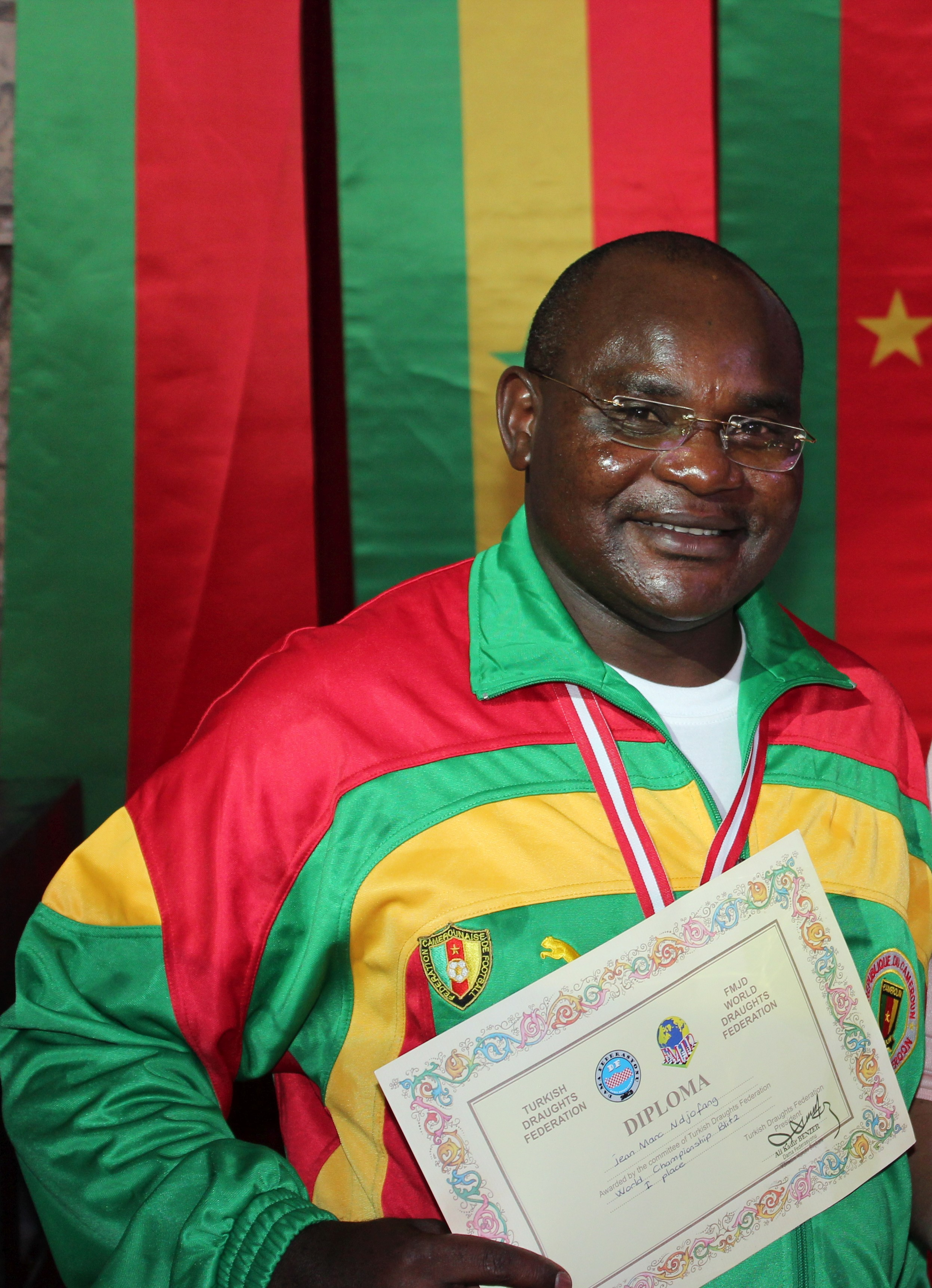 Jean Marc Ndjofang välkkabe maailmameistrina 2017